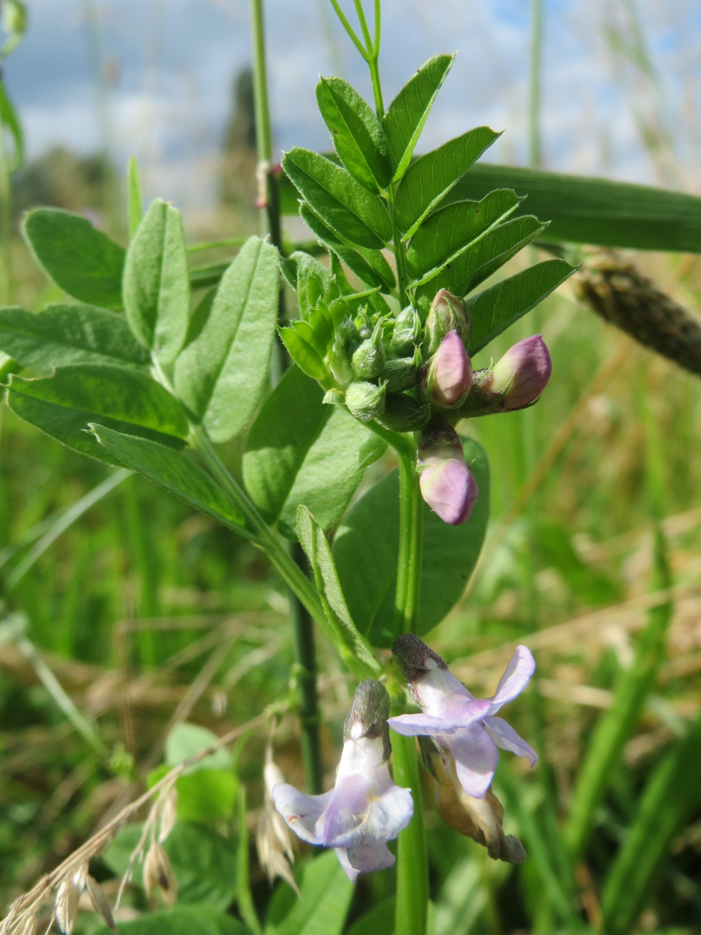 Zaun-Wicke (Vicia sepium) im Naturschutzgebiet Bachwiesen/Leopoldswiesen im Hockenheimer Rheinbogen